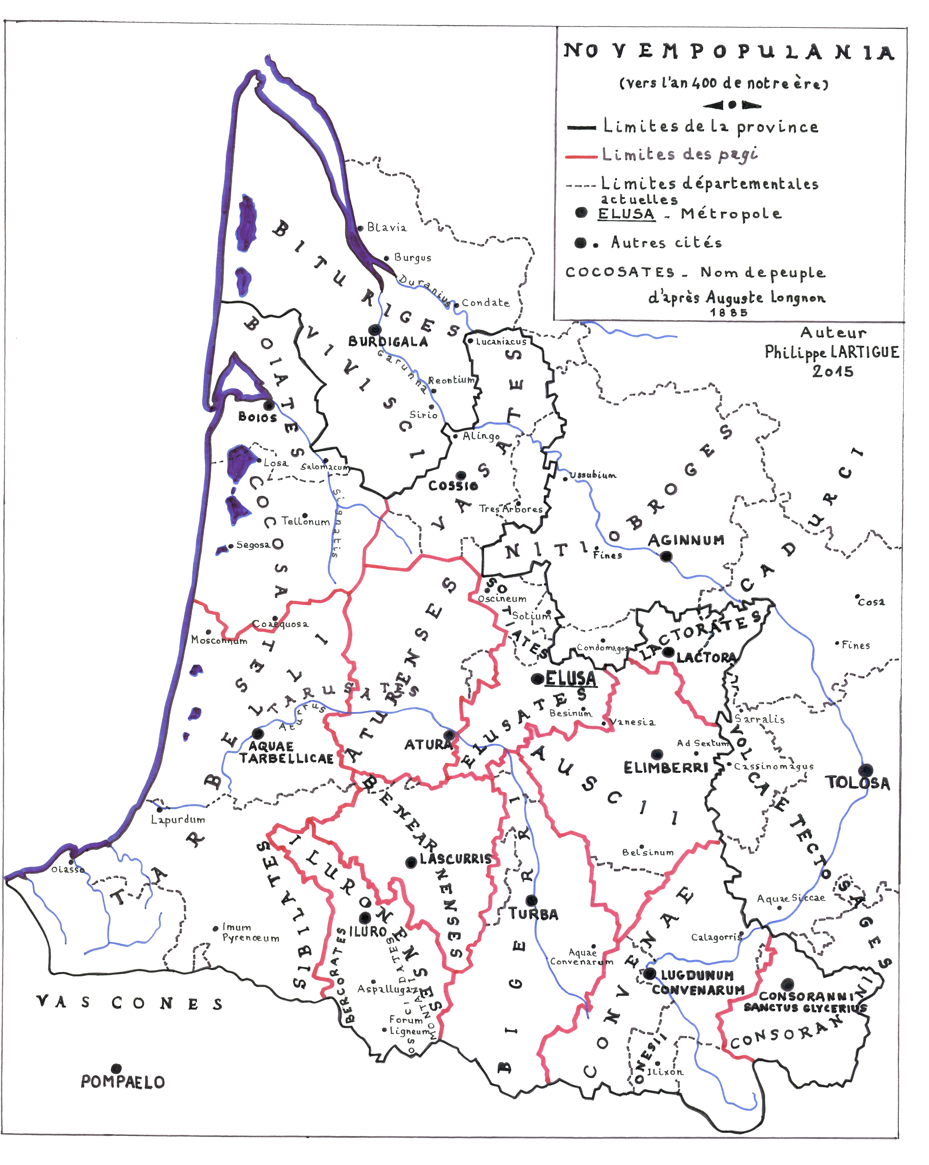 Carte de la Novempopulanie en l'an 400, d'après Auguste Longnon.